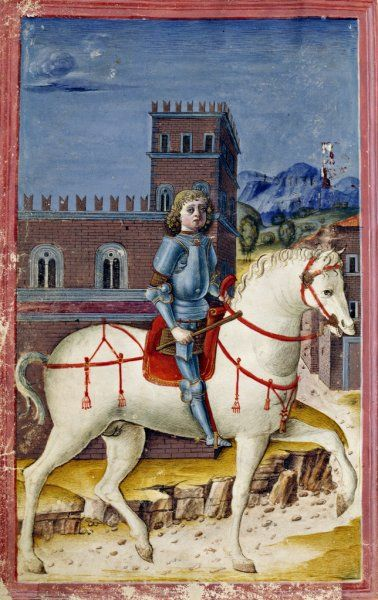 Massimiliano Sforza a cavallo, Cristoforo de Predis e Boccaccio Boccaccino, XV sec.